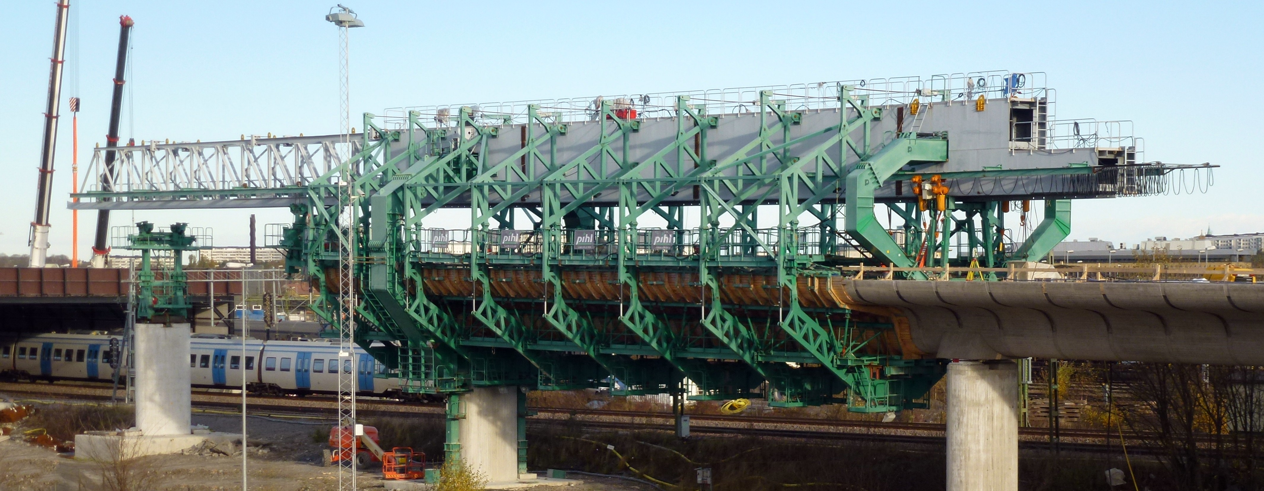 Järnvägsbron Årsta-Älvsjö, formvagnen vid Älvsjö